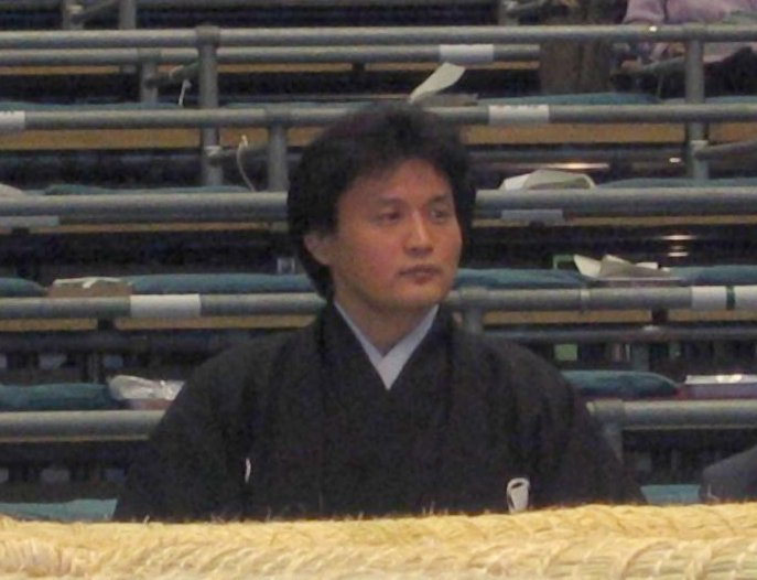 Ex-Yokozuna Takanohana II at the Osaka Honbasho 2005.